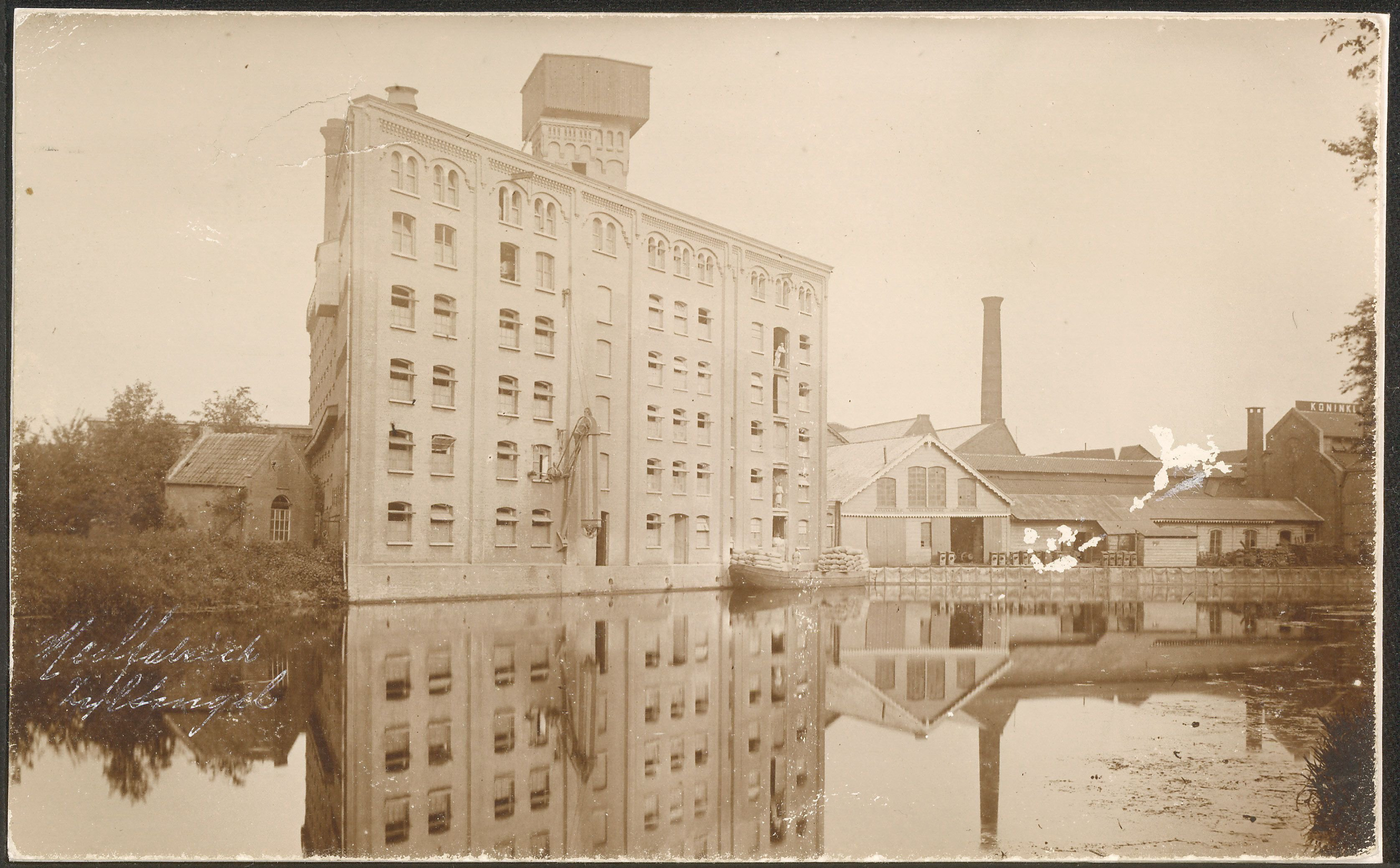 Meelfabriek De Sleutels, Oosterkerkstraat 18 te Leiden. De gevel van de Meelfabriek aan de Zijlsingel.